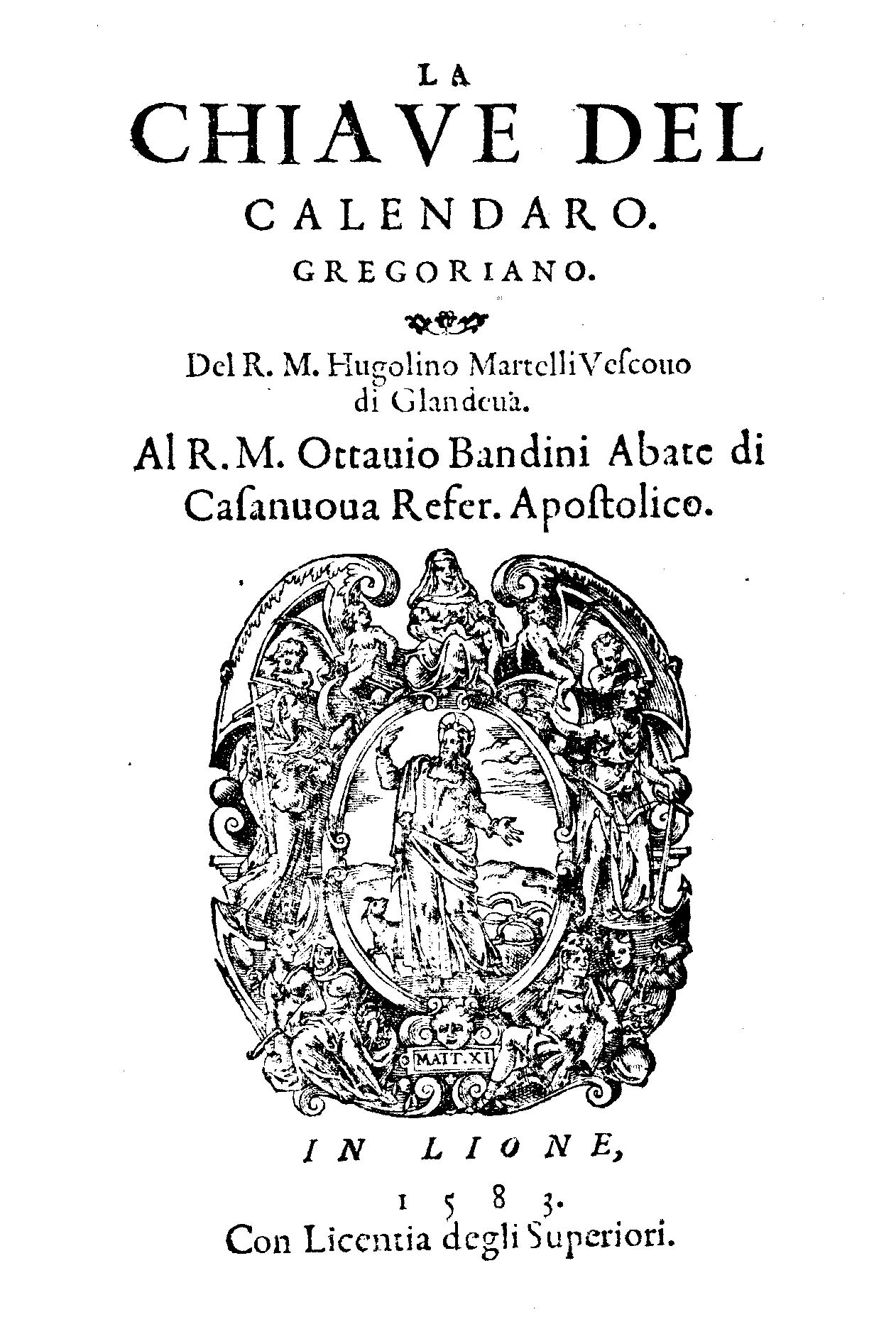 La chiaue del calendaro gregoriano. Del r.m. Hugolino Martelli vescouo di Glandeua. - In Lione : [s.n.], 1583. - [36], 362, [6] p. ; 8º. - Per il tipografo cfr.: N. Bingen, Philausone (1500-1660), Repertoire des ouvrages en langue italienne publiés dans les pays de langue française de 1500 à 1660, n.451 .